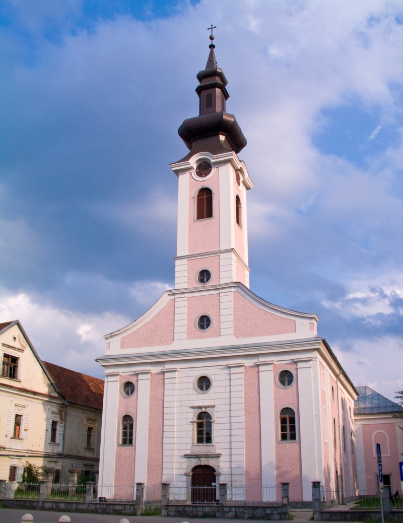 Crkva Svetog Trojstva u Otočcu